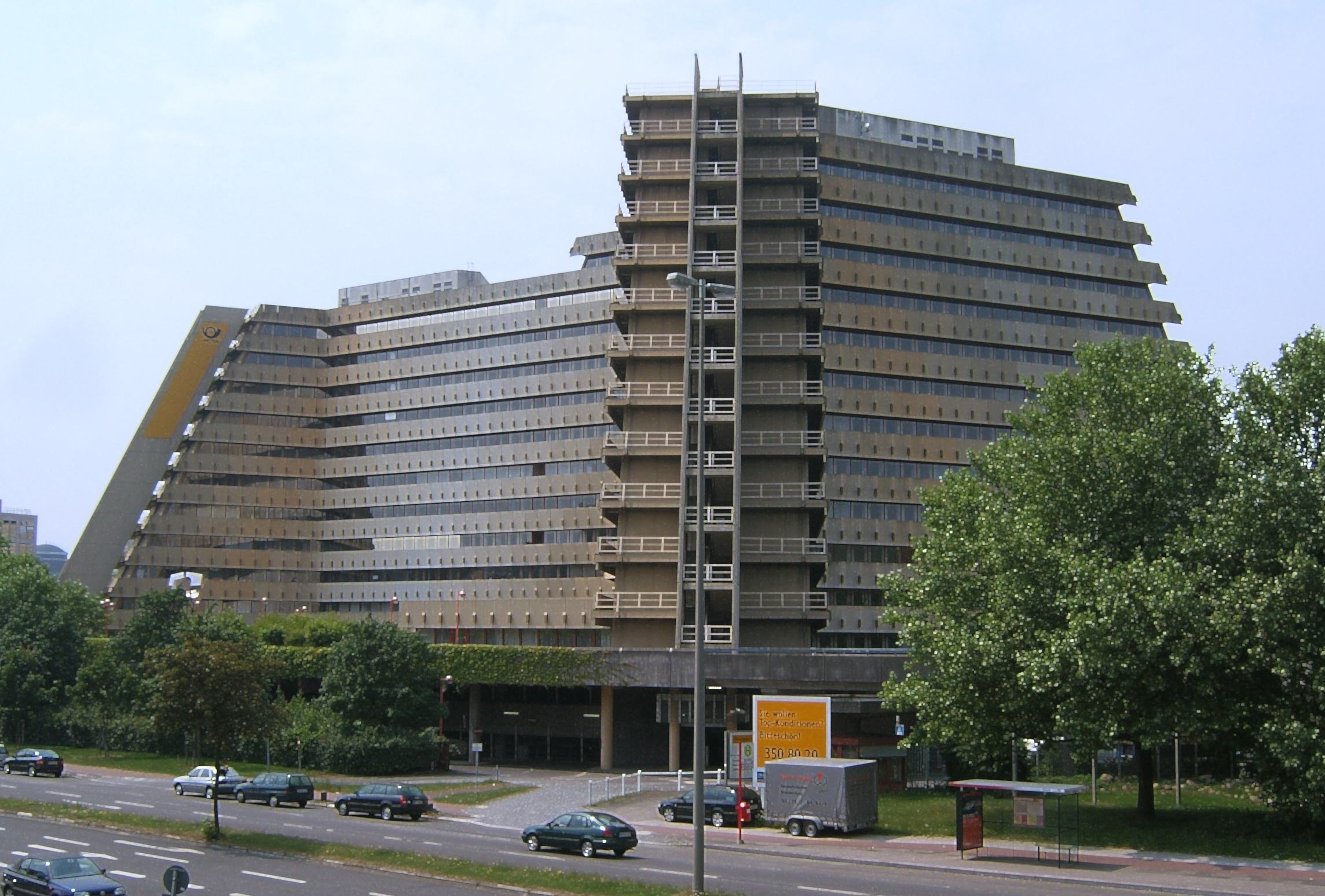 Ehemalige Oberpostdirektion in der City Nord in Winterhude.